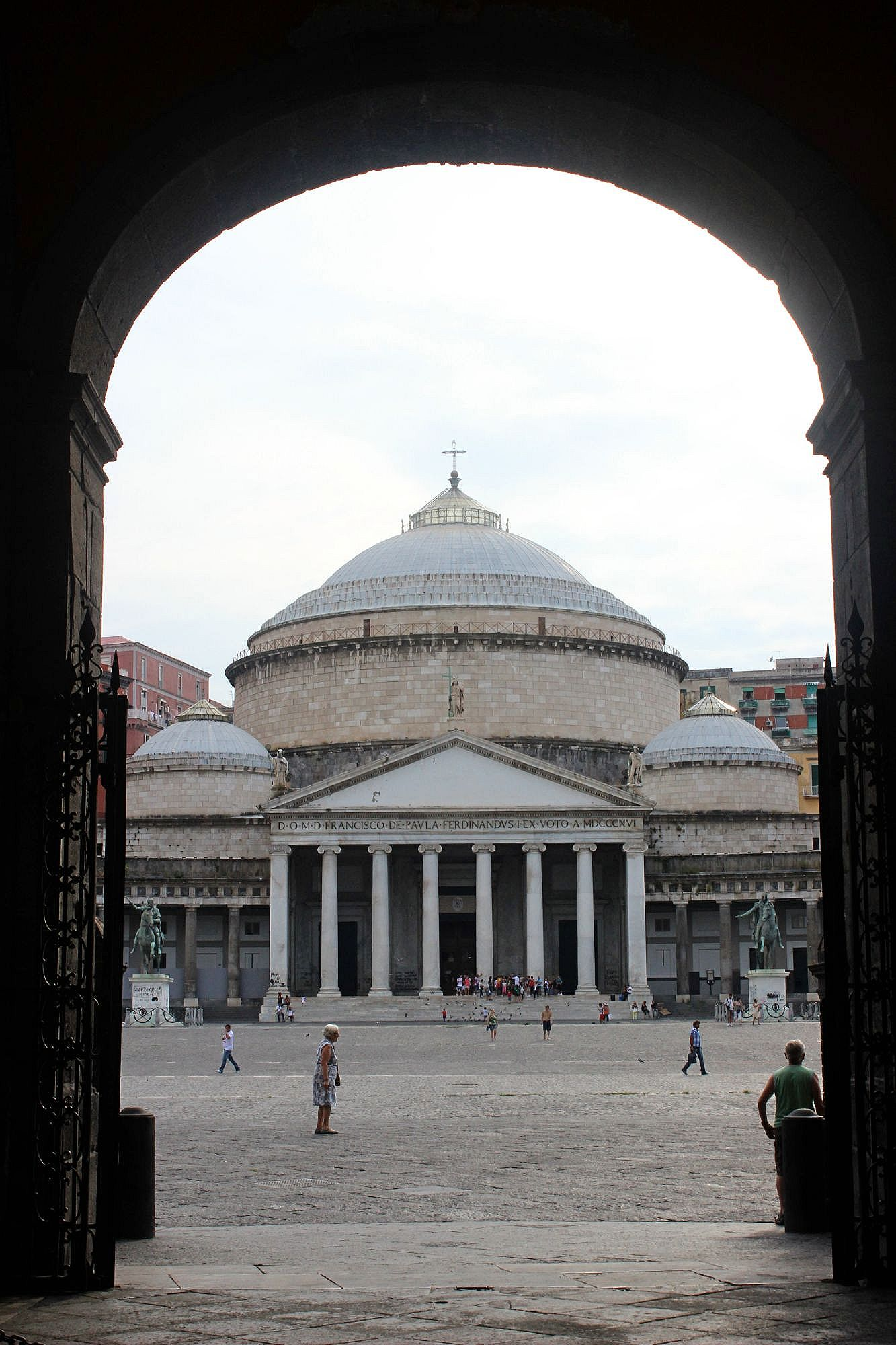 Nápoles. San Francesco di Paola. Exterior.